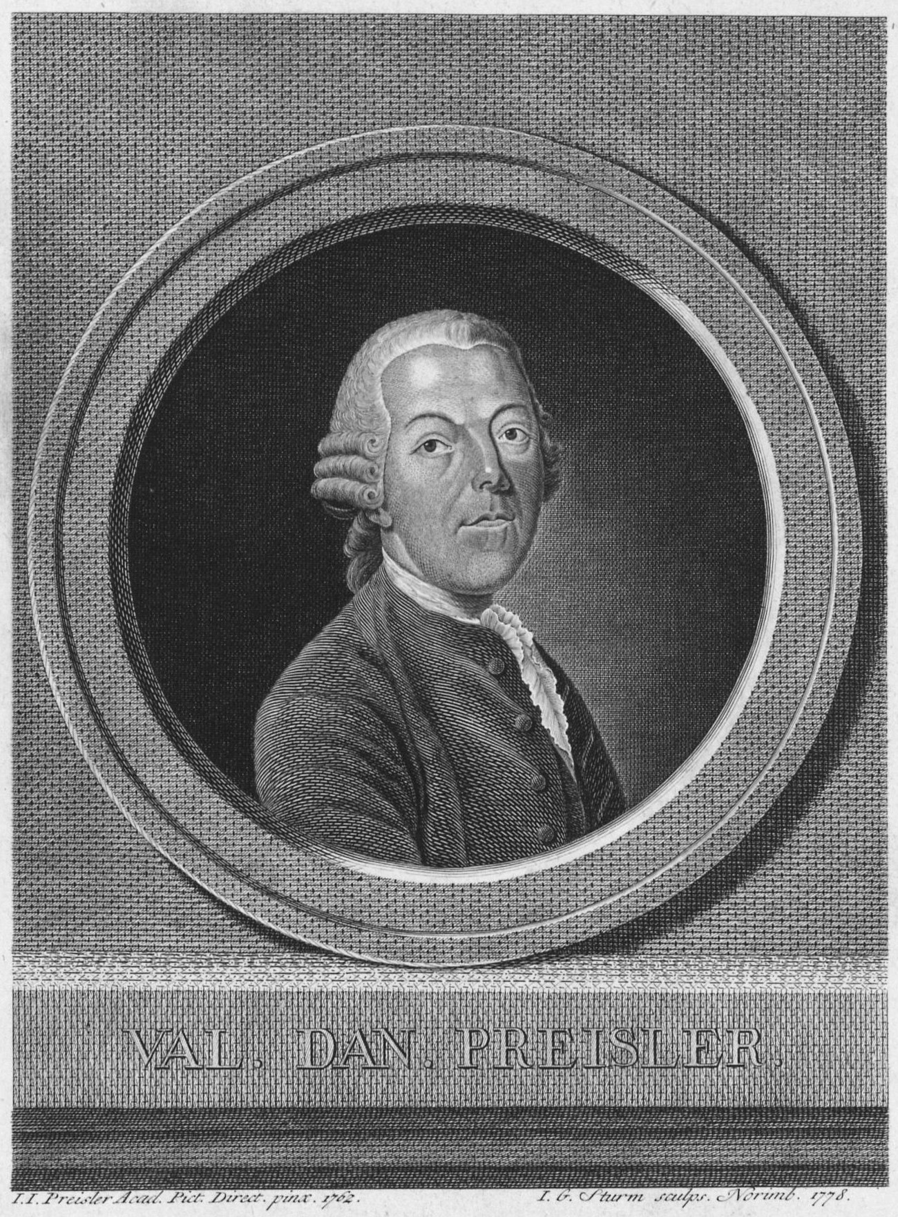 Depicted person: Valentin Daniel Preisler